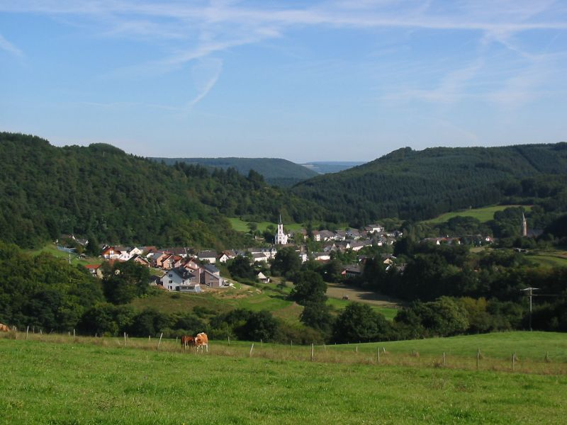 Ortsgemeinde Bruch, Ortsteil Staudt